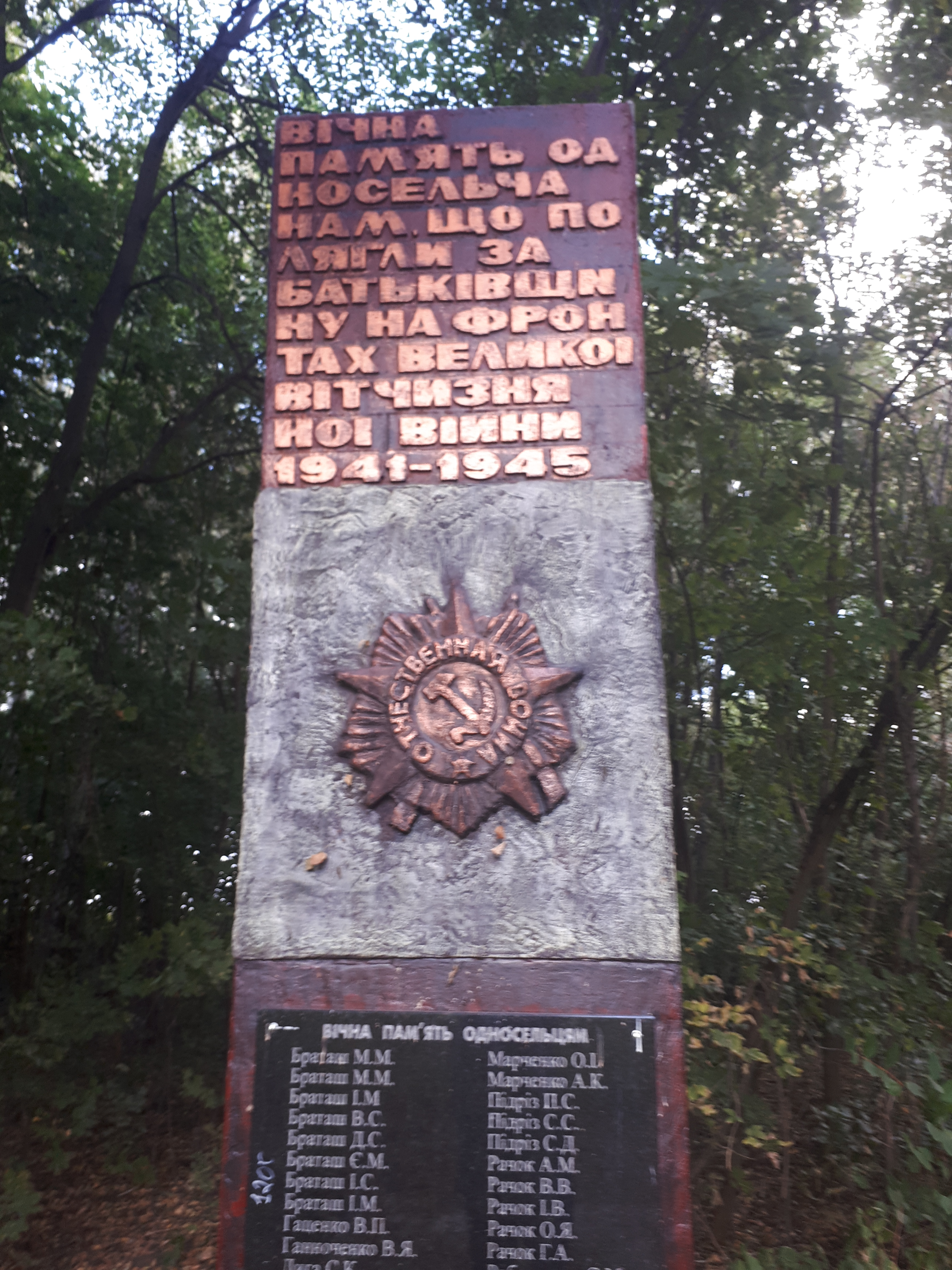 Пам’ятник воїнам- односельчанам ( меморі.дошка ), с. Лавіркове